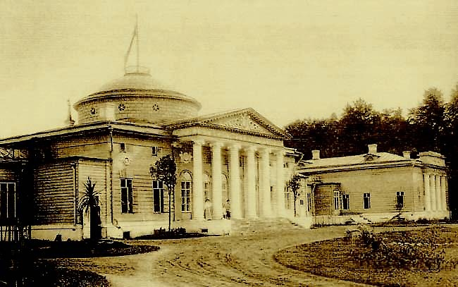 Akhtyrka Manor